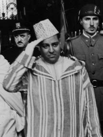 El jalifa marroquí Muley Hassán, a su llegada a la Estación de Atocha (Madrid).